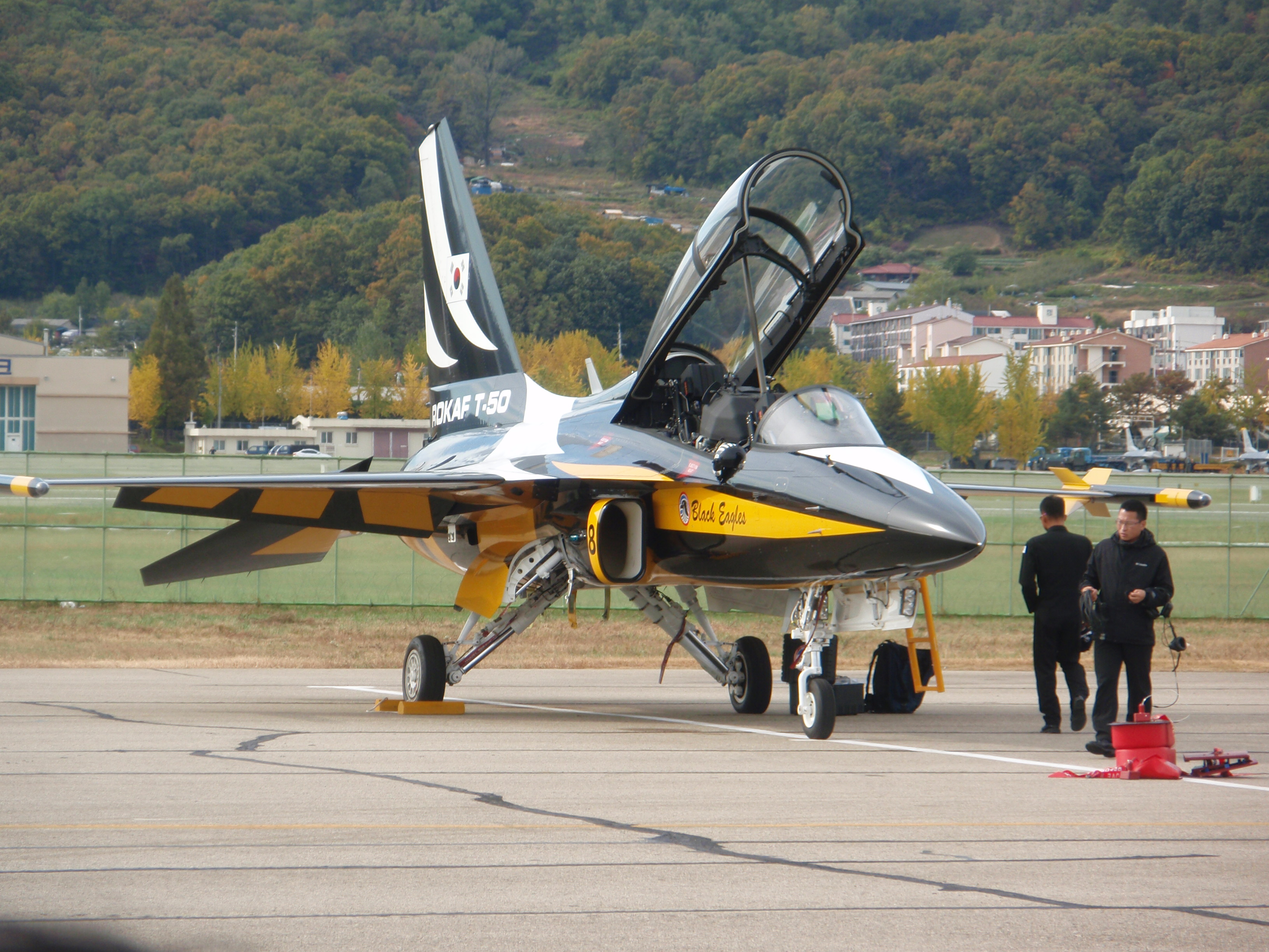 ブラックイーグルス、T50